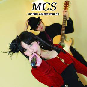 MCS 3rd Solo Live 2014年9月20日 チラシ画像